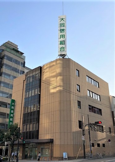 本店建物の外観